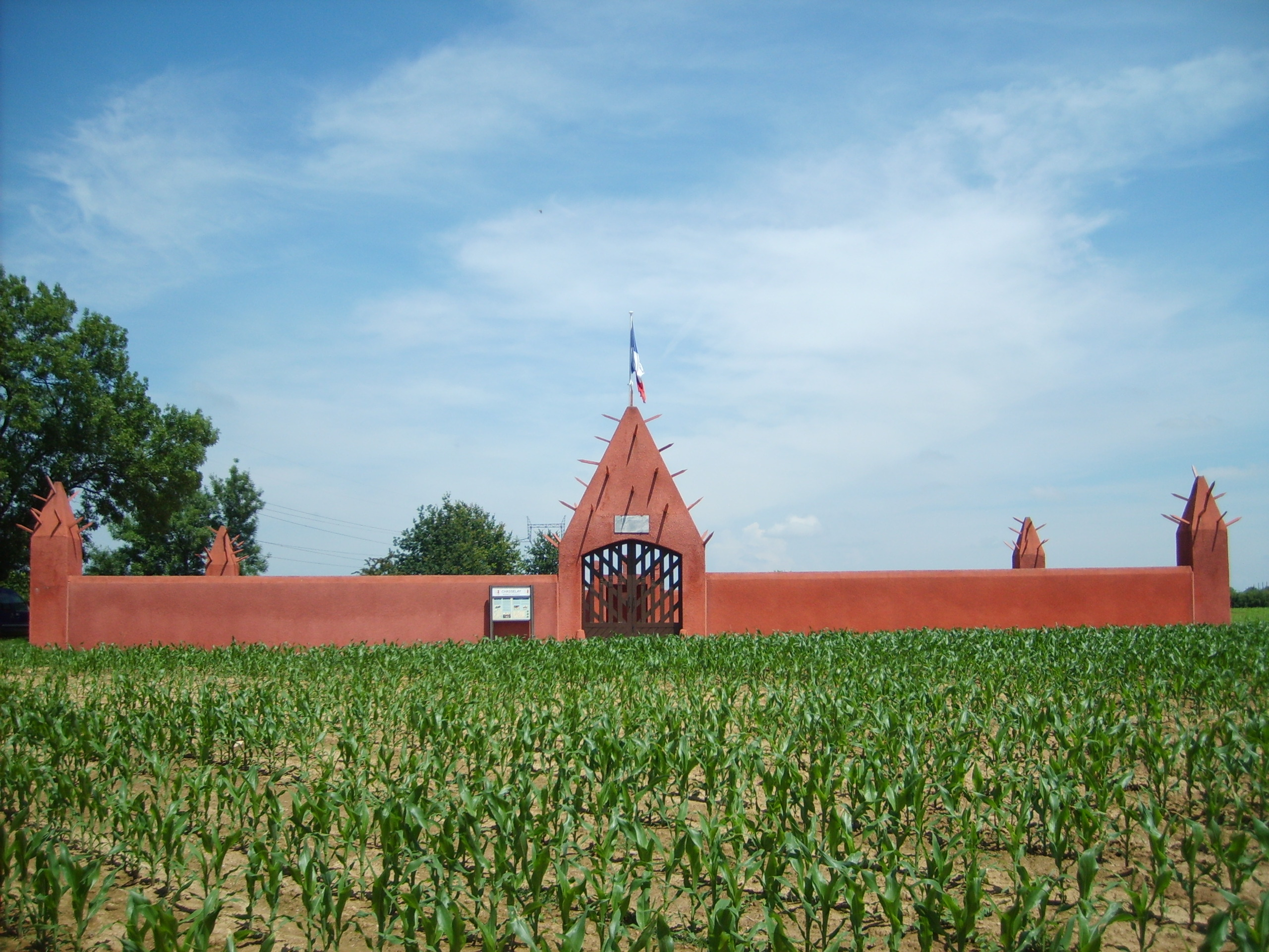 Le Tata sénégalais de Chasselay, nécropole militaire situé à Chasselay dans le Rhône, France.